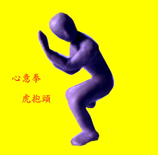 心意拳虎抱頭